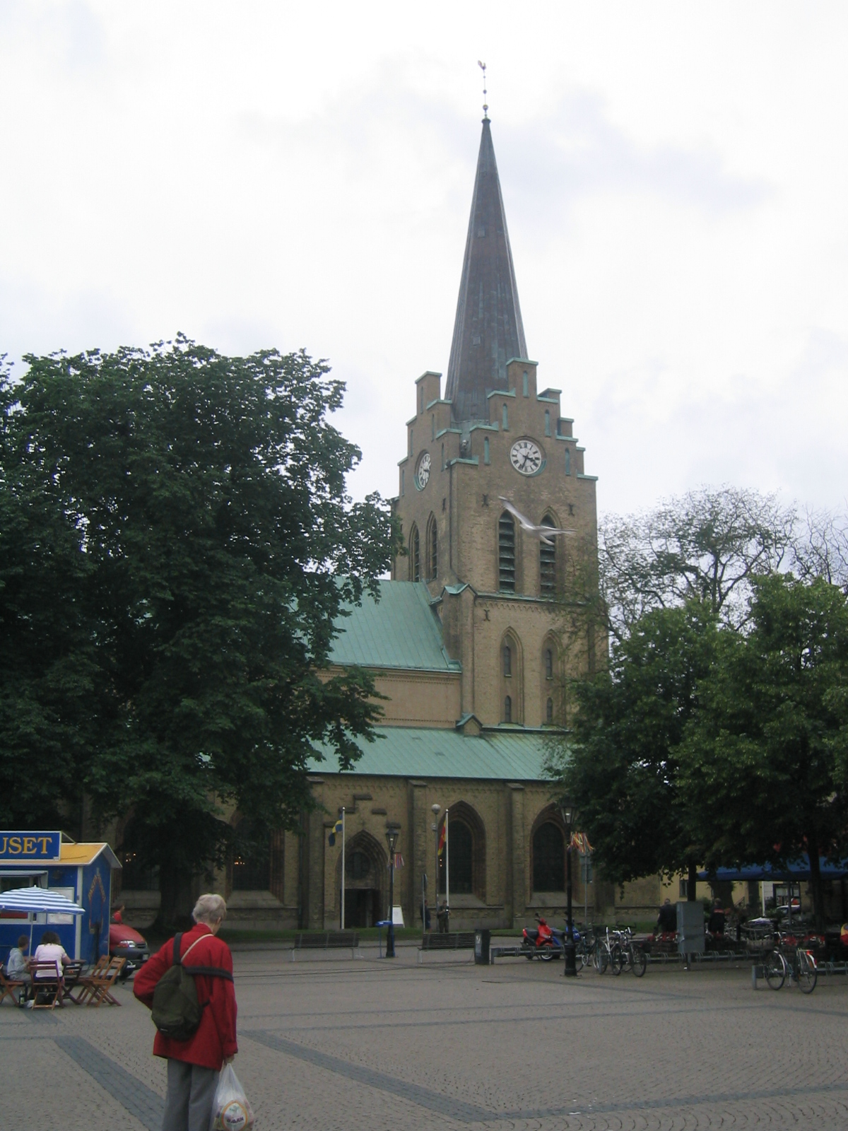 St_Nicolai_kyrka Halmstad